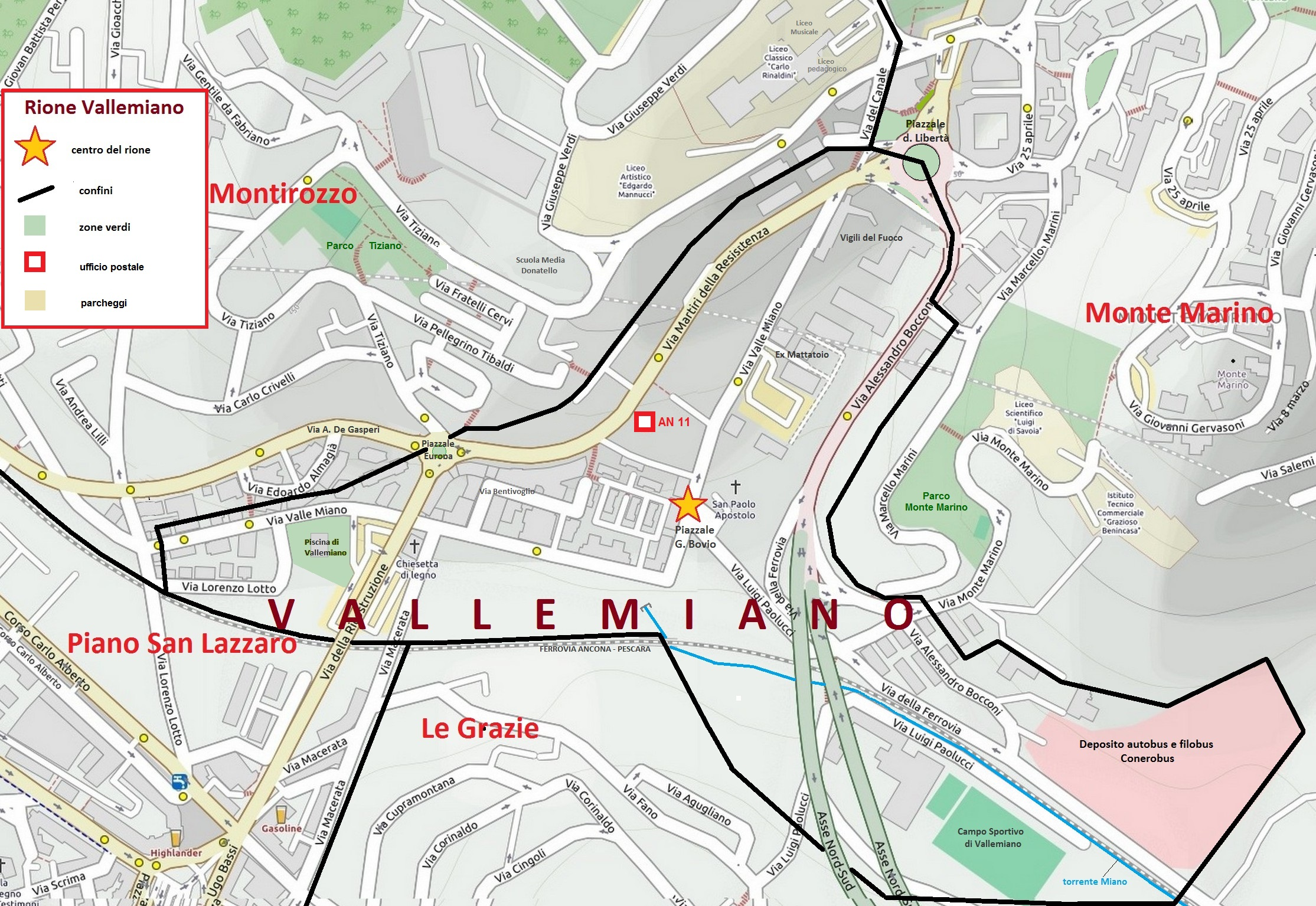 Mappa del Rione Vallemiano di Ancona, con i confini, le vie, le piazze e i parchi.